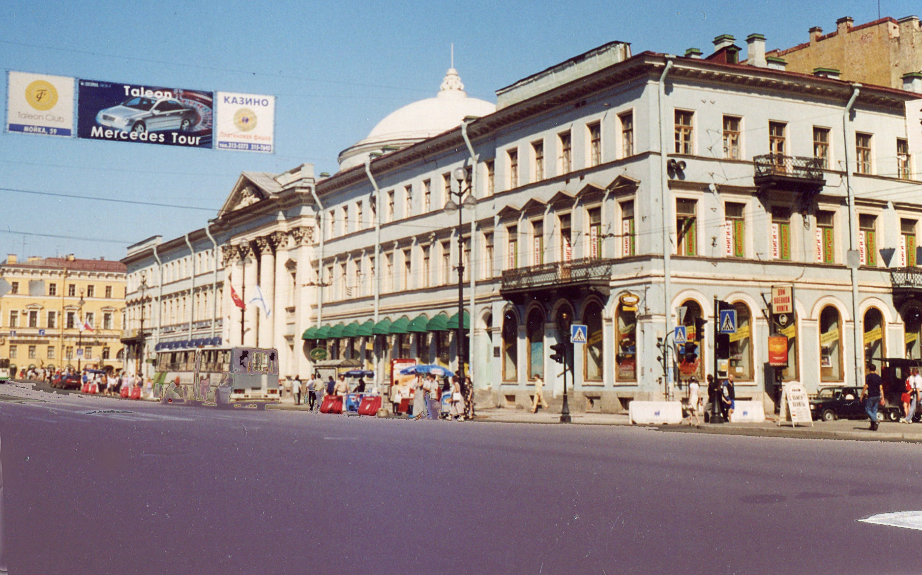 Здание бывшей голландской церкви на Невском.